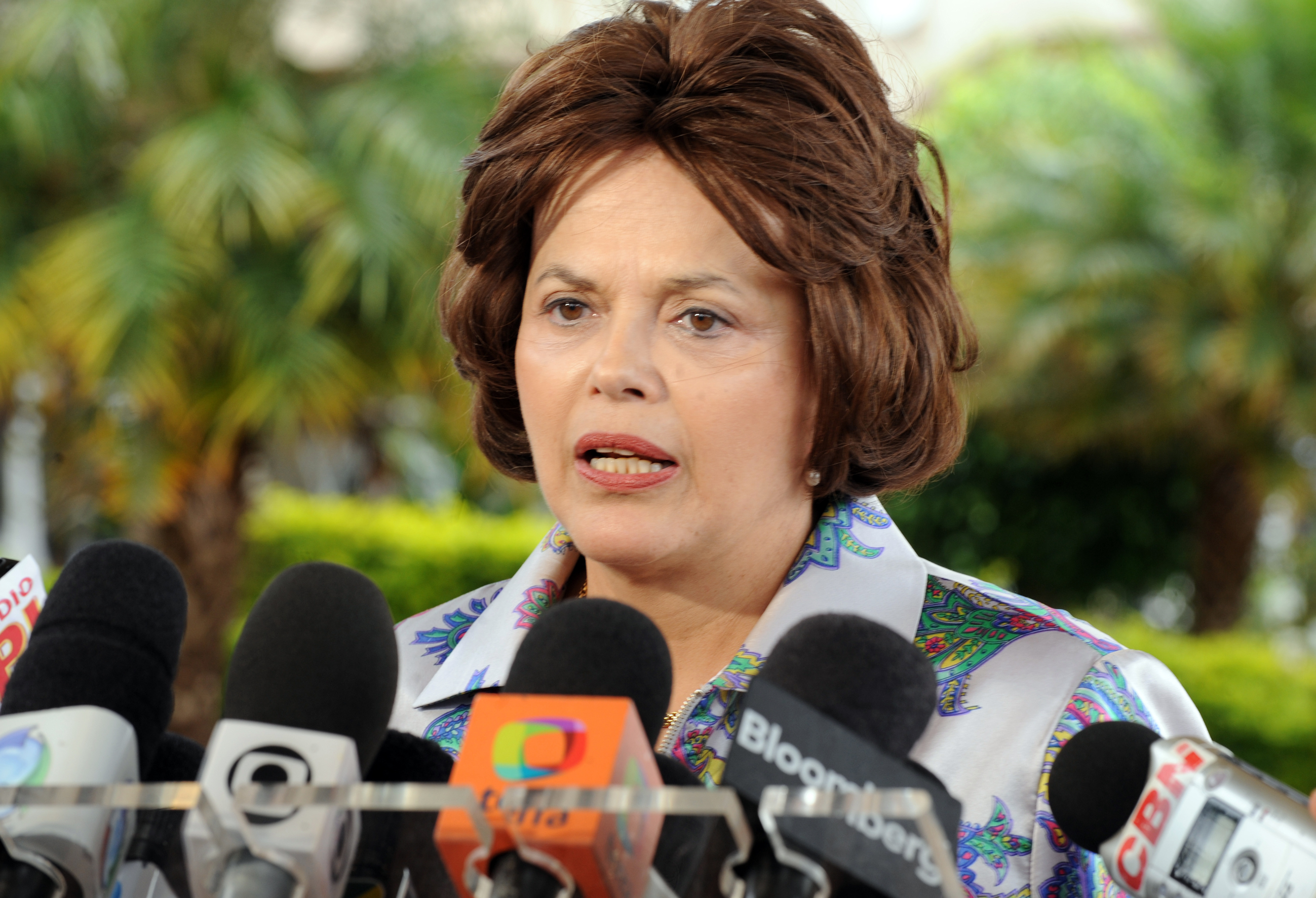 A ministra-chefe da Casa Civil, Dilma Rousseff, em entrevista na Base Aérea,após embarque do presidente Lula para uma viagem de nove dias a três países